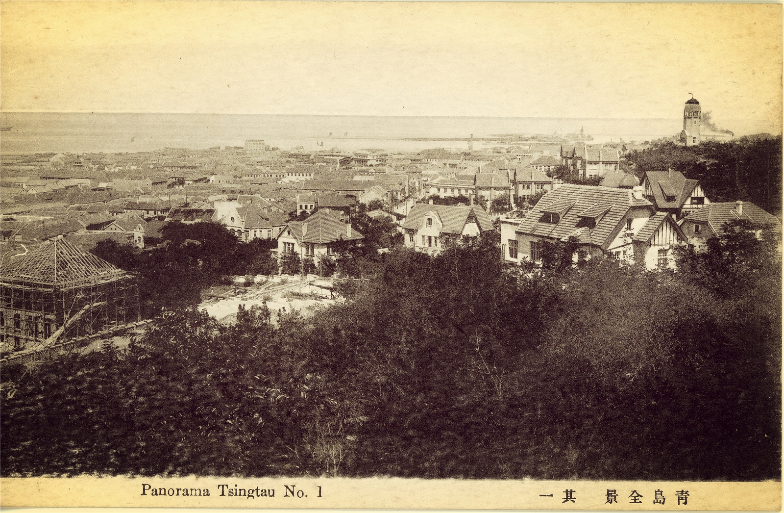 青岛二十年代末观海山全景